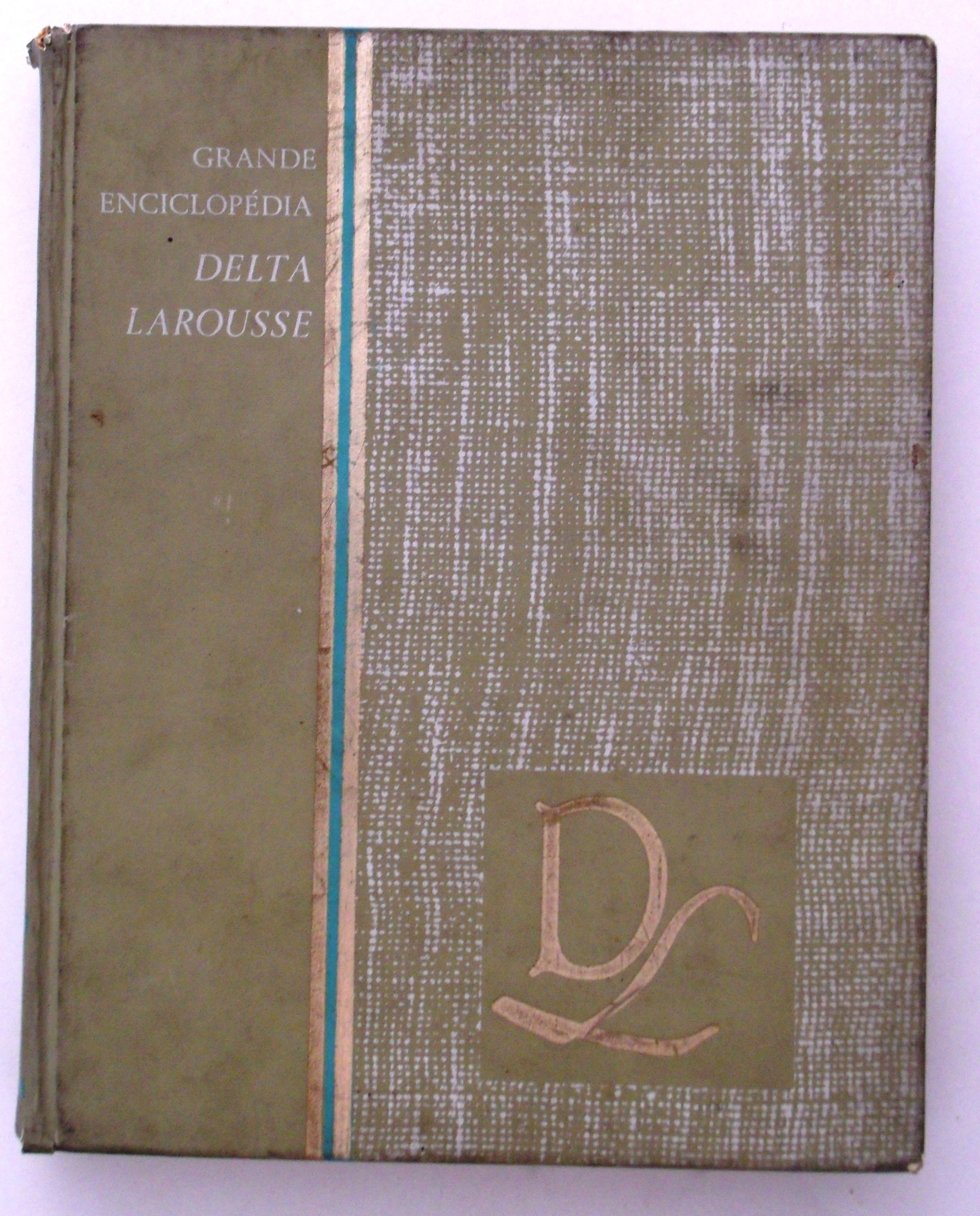 Imagem de um volume da Grande Enciclopédia Delta larousse.